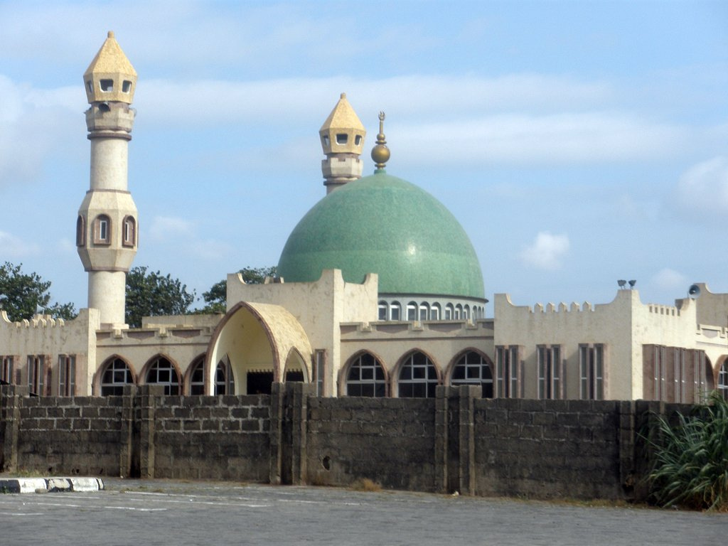 Mosque in Lagos